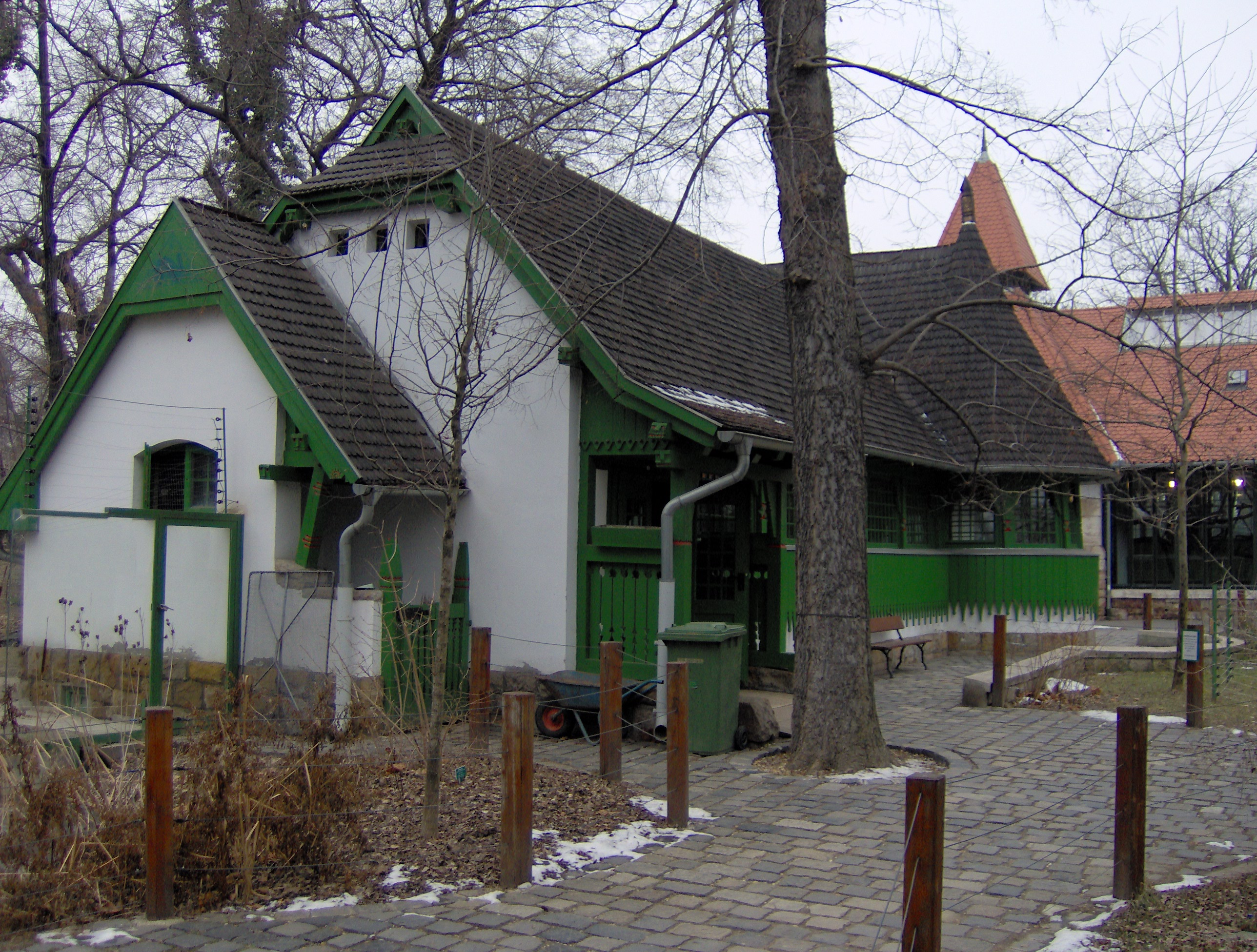 Budapesti állatkert, Rágcsálóház